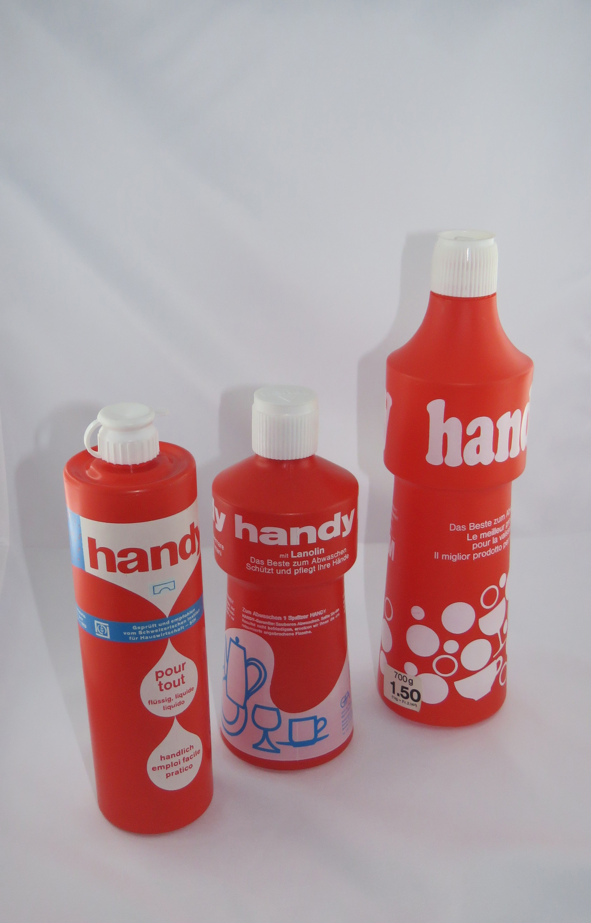 Migros-Produkteverpackung Handy-Spülmittel Entwicklung 1958-1976